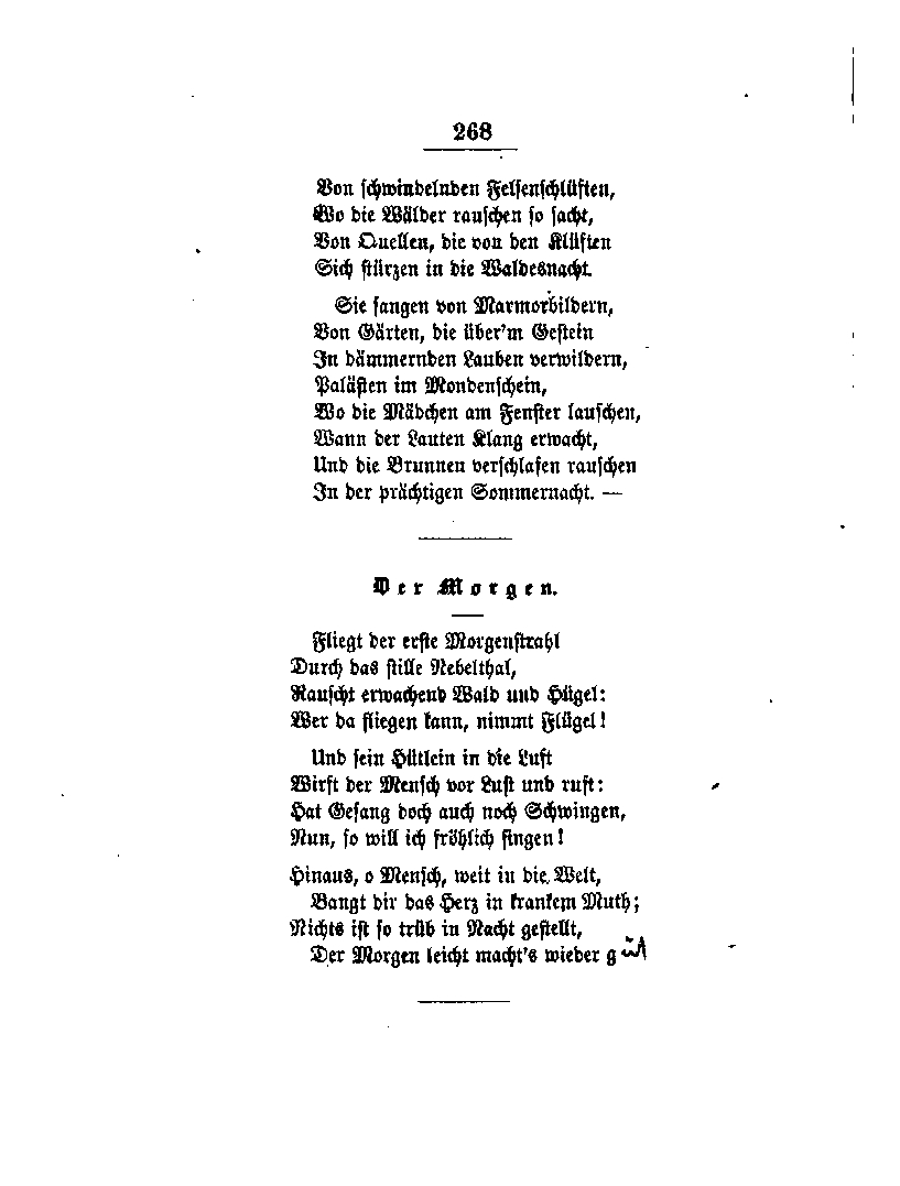 Sehnsucht aus: Joseph Freiherrn von Eichendorff‘s sämmtliche Werke. 2. Auflage